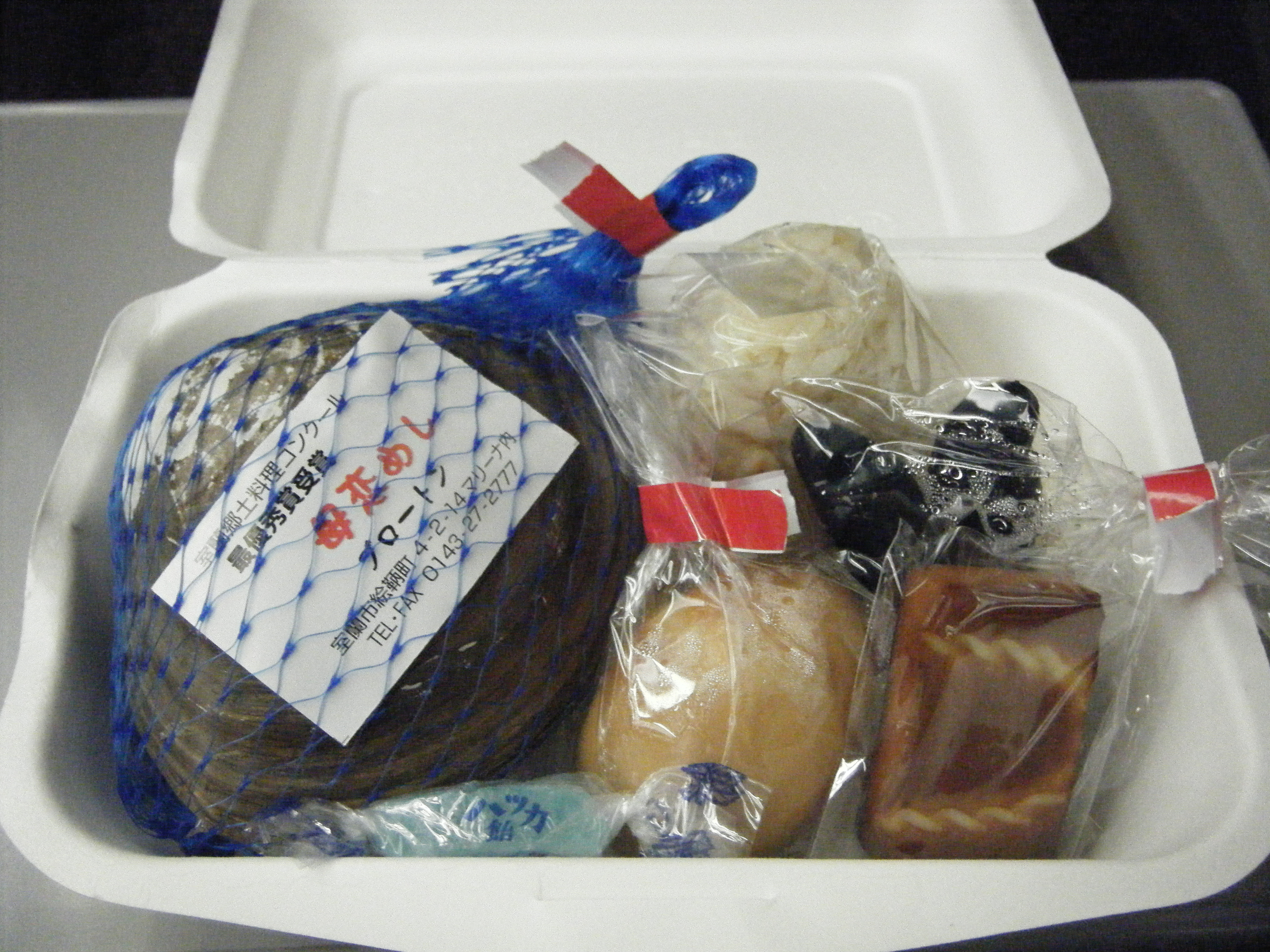 母恋めし（JR北海道 室蘭本線 母恋駅駅弁）